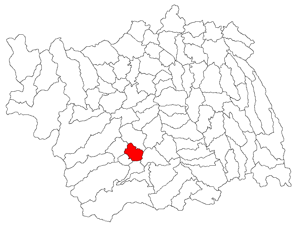 Categorie:Hărţi ale judeţului Bacău